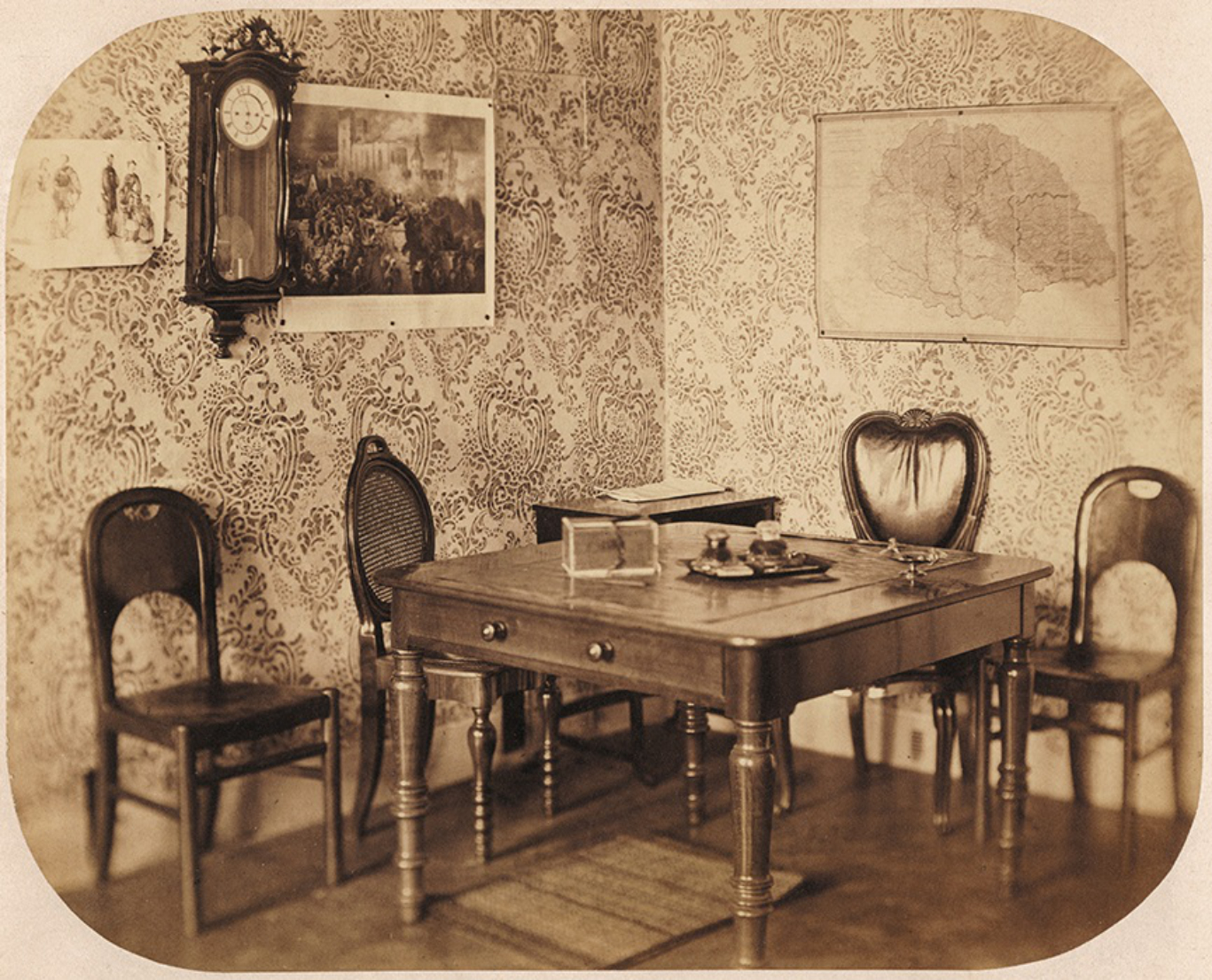 Szoba Széchenyi István döblingi lakosztályában. A korai Thonet-székekkel berendezett szoba falán Magyarország térképe mellett a Vahot Imre tervei szerint Vízkelety Béla és Franz Kollarz által készített Eger ostromát ábrázoló litográfia és a Napkelet egyik 1860. évi, szintén Vízkelety által rajzolt divatképe látható